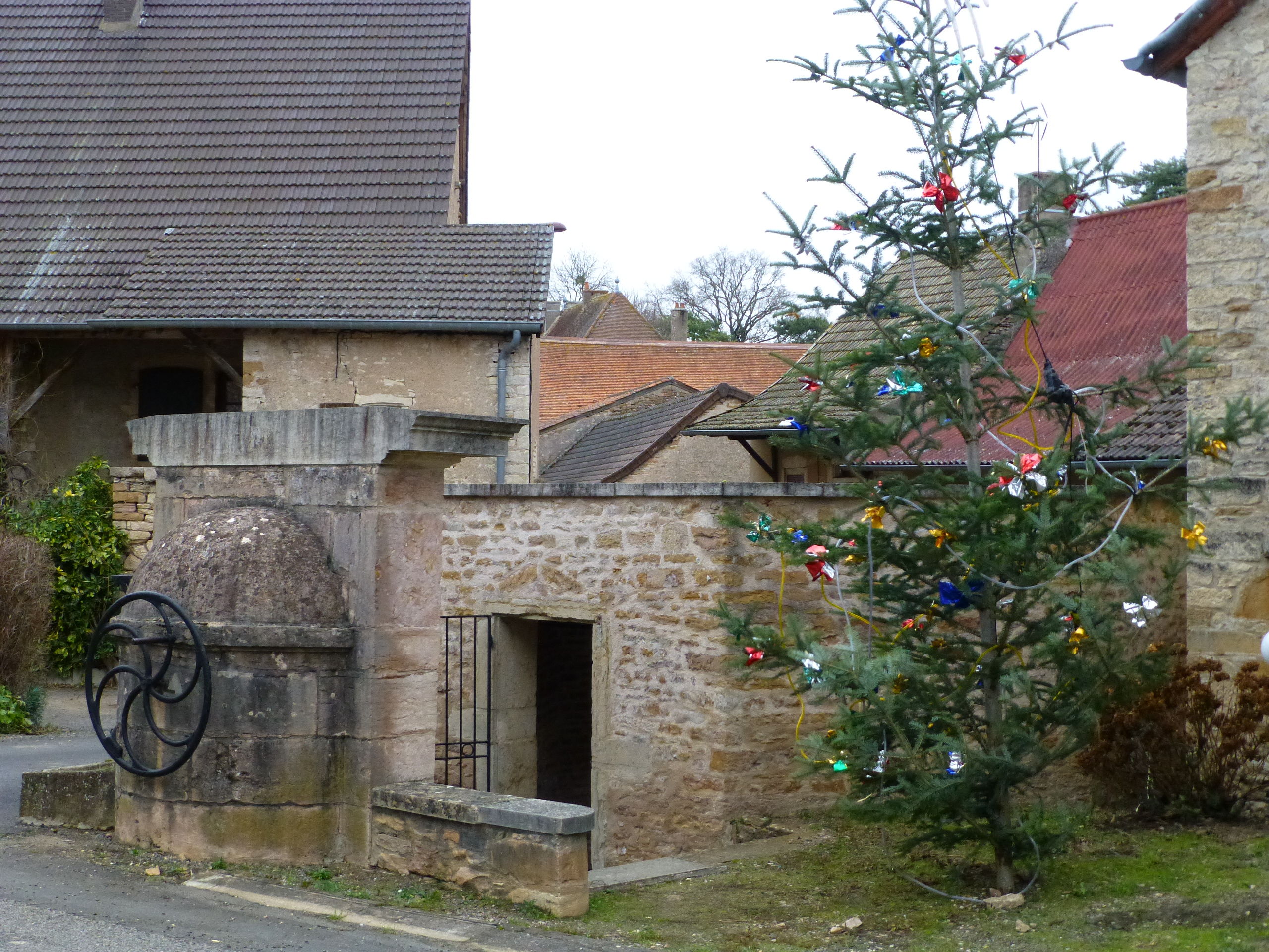 Lavoir de Bissy-sous-Uxelles (71)